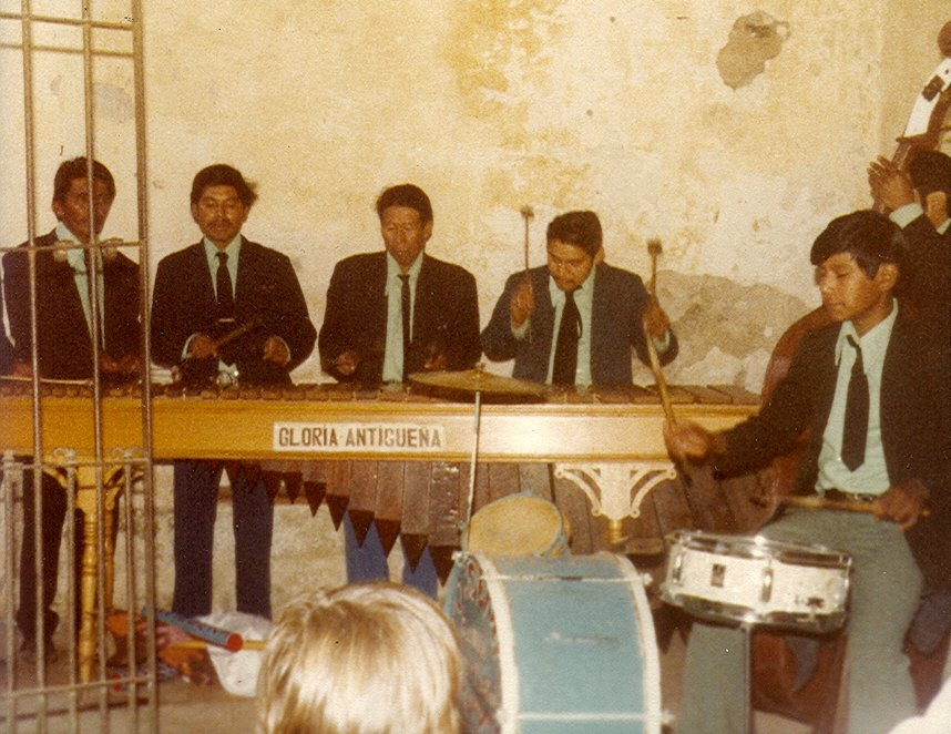 Marimba Band "La Gloria Antigueña", Antigua Guatemala, 1979 Photo by Infrogmation